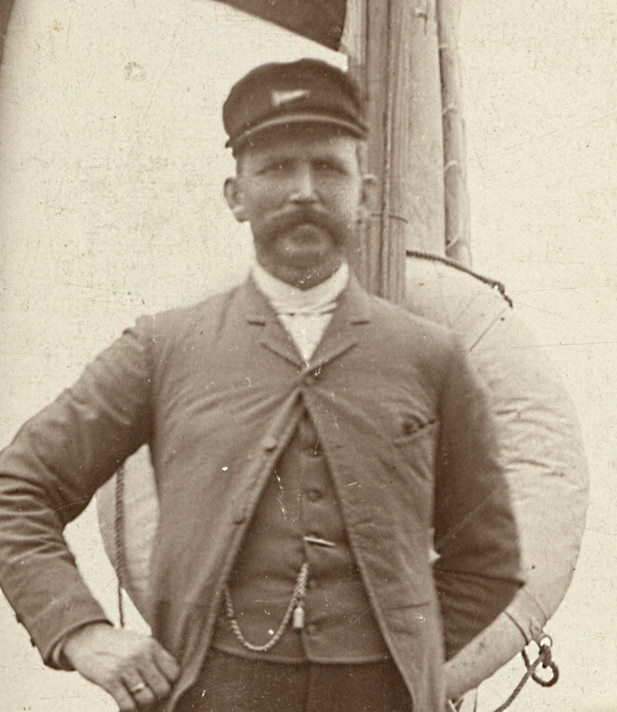 Magnus Andersen, ombord i "Viking" (b.1893, A/S Framnæs mekaniske verksted, Sandefjord). - I New York på vei til verdensutstillingen i Chicago 1893.